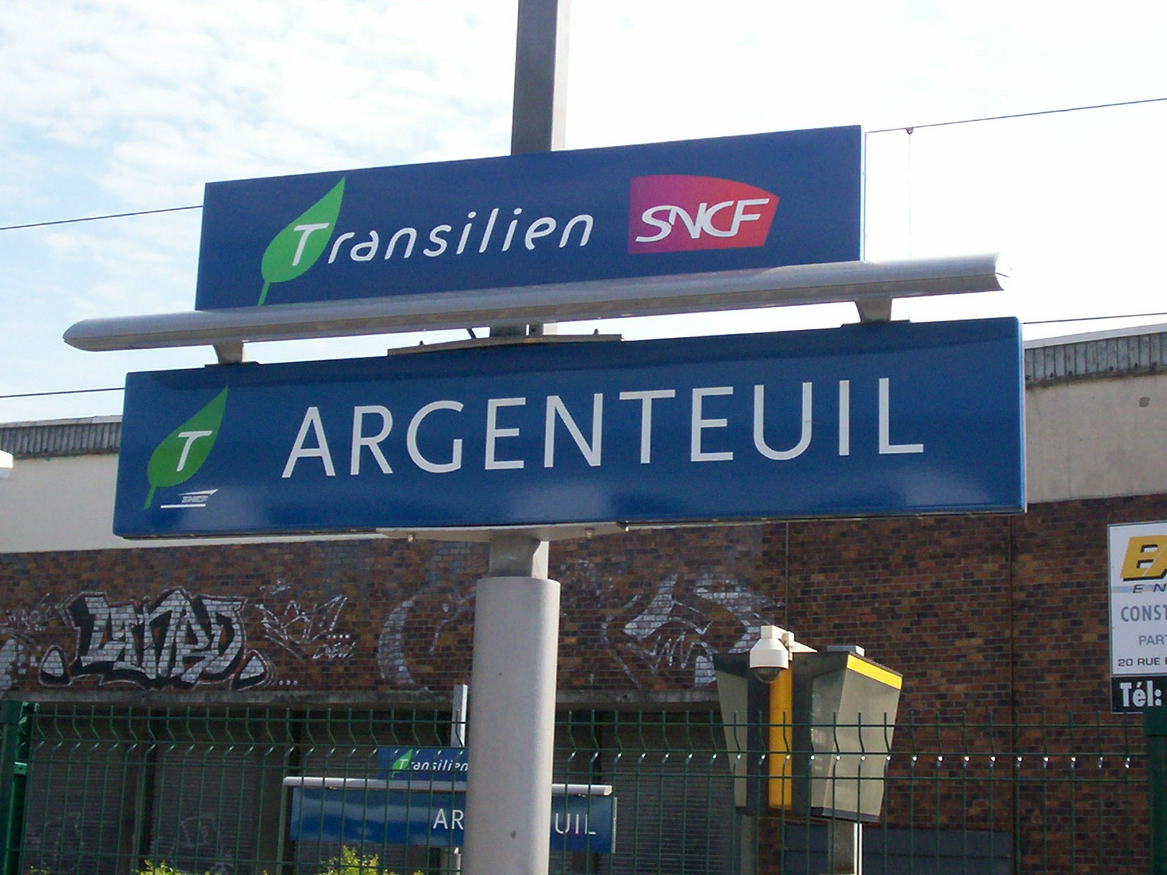 Gare d'Argenteuil